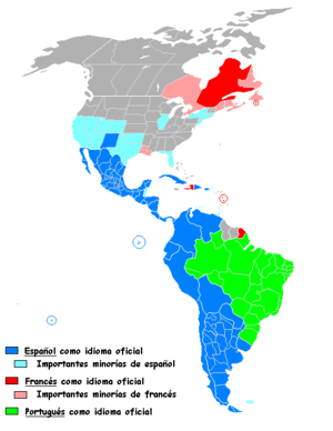 Dictaduras en América Latina, siglo XX